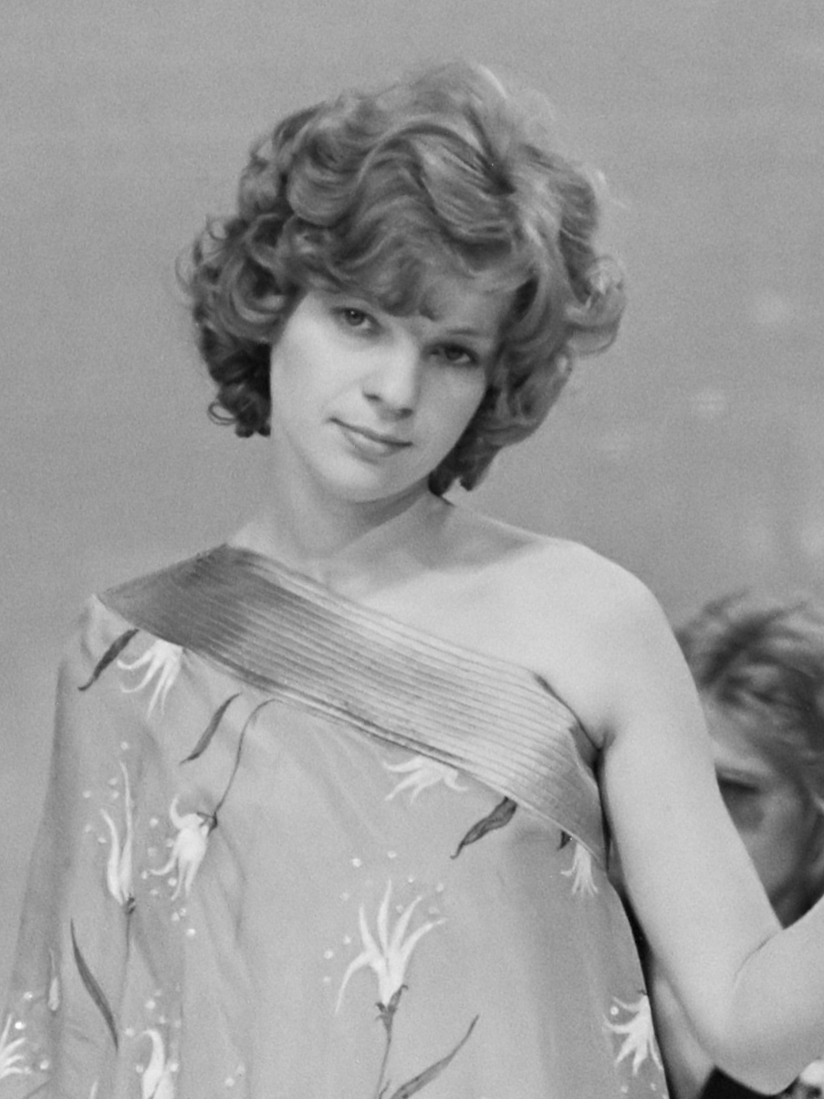 Nationaal Songfestival in Jaarbeurs Utrecht; Teach In tijdens generale repetitie 26 februari 1975